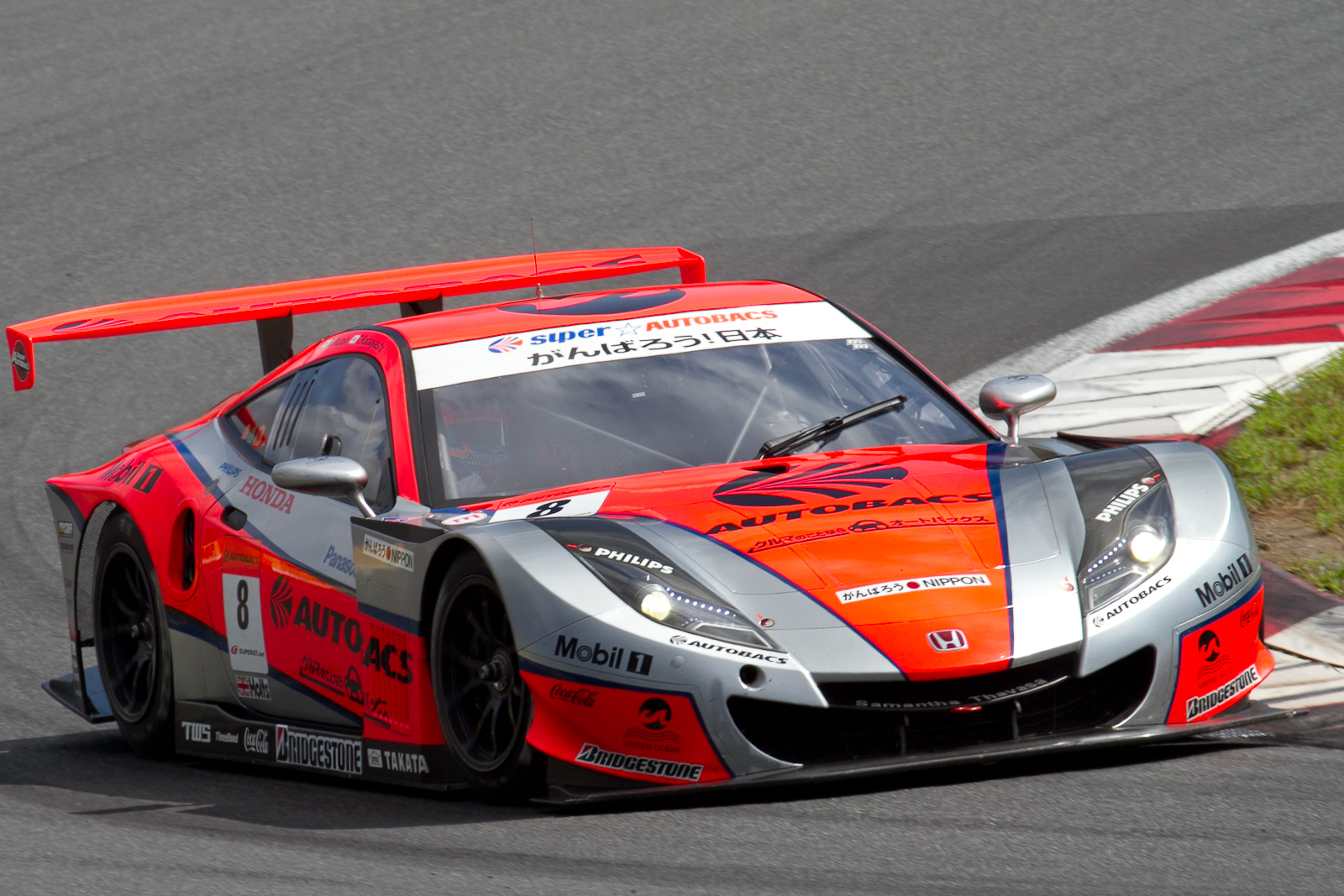 Super GT 2011 Rd.6 Fuji GT 250km: Takashi Kobayashi (ARTA) driving the Honda HSV-010 GT.